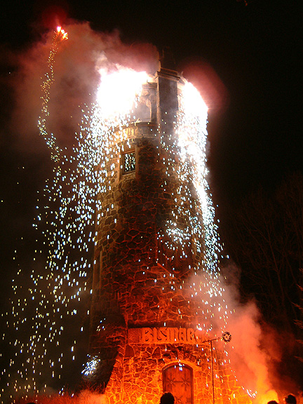 Feuerwerk zur 100 Jahr Feier am Bismarckturm in Spremberg/ Niederlausitz, Land Brandenburg/ Deutschland